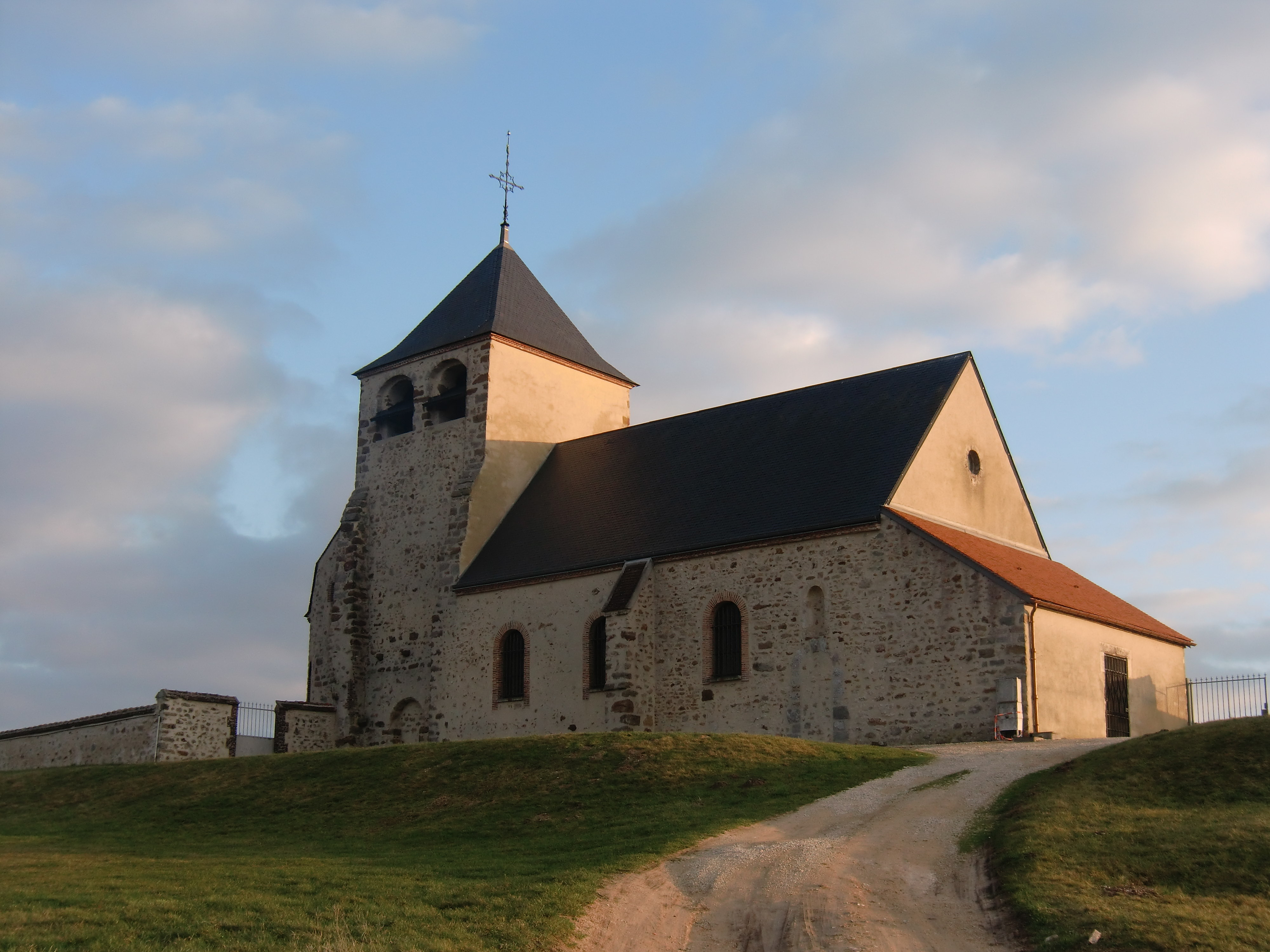 Eglise Saint-Hilaire de Saint-Hilaire-sous-Romilly (Aube - Champagne - France)